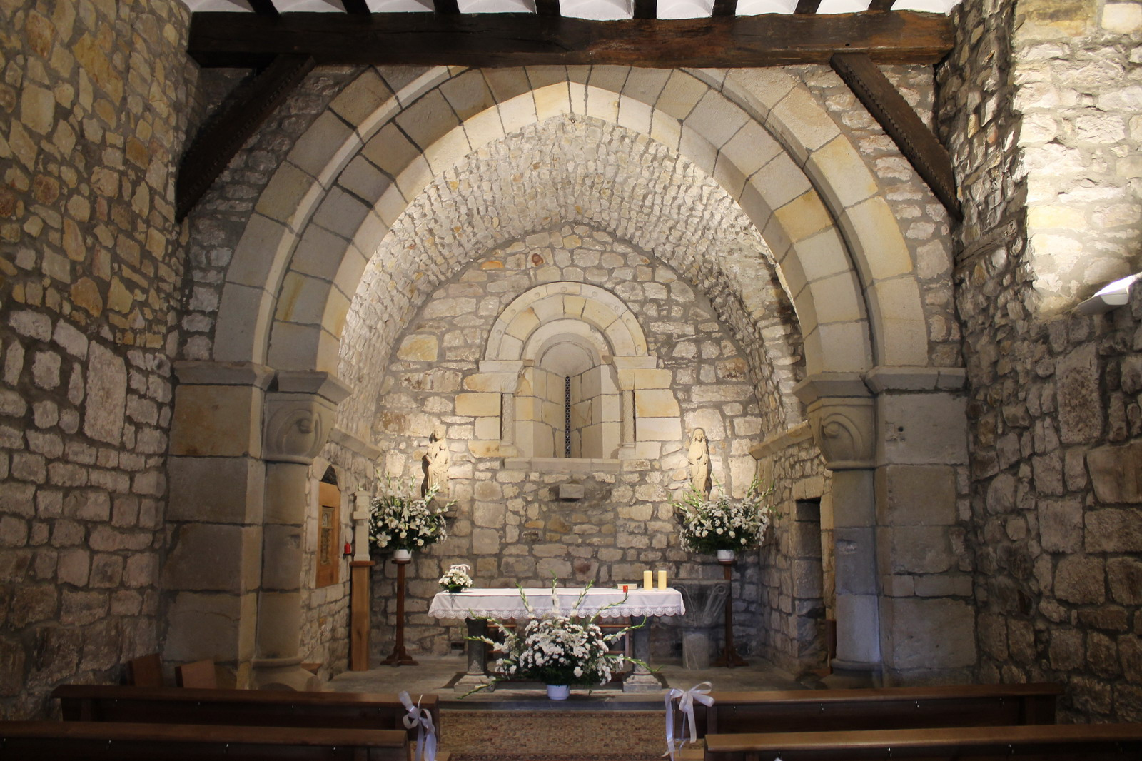 Interior de la ermita de San Pelaio (Bakio)